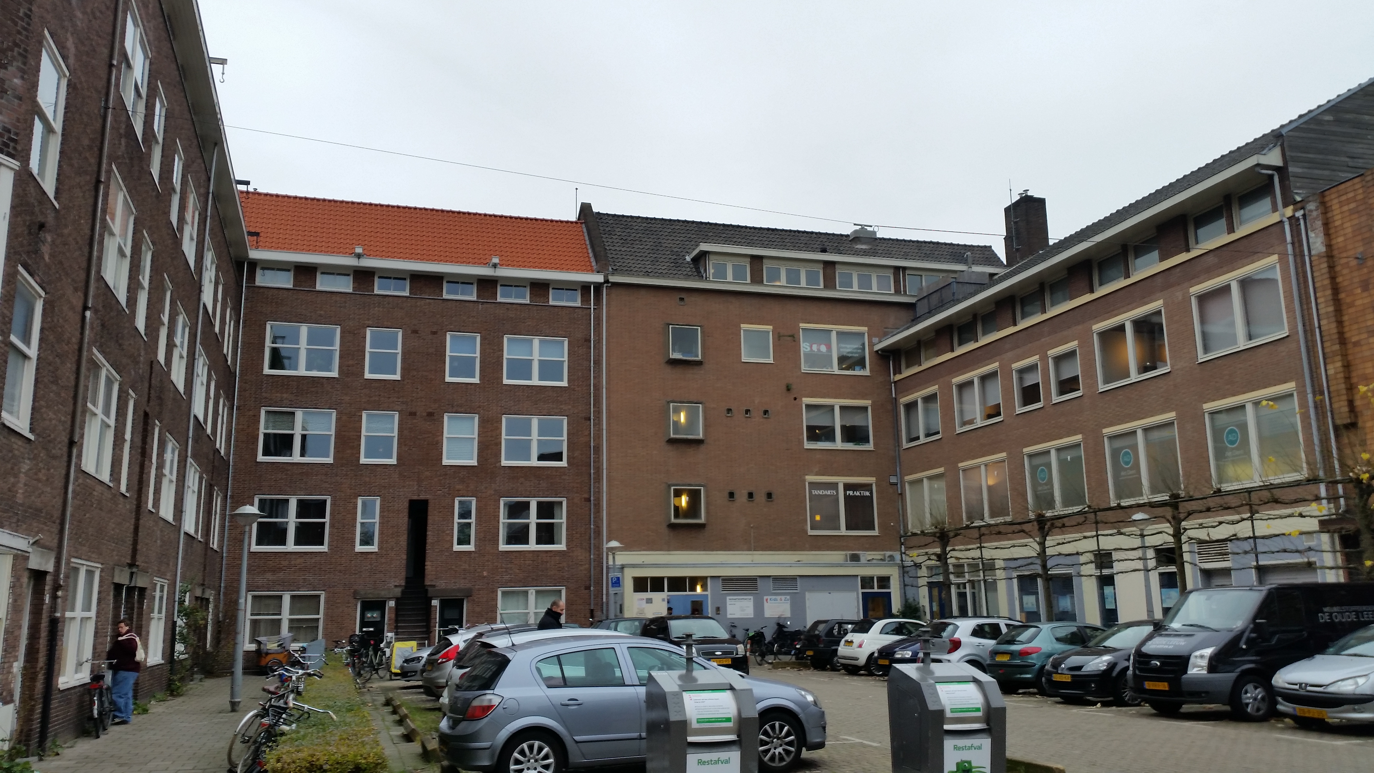 Doorkijk op het plein Cornelis Dirkszstraat 13-29, Amsterdam